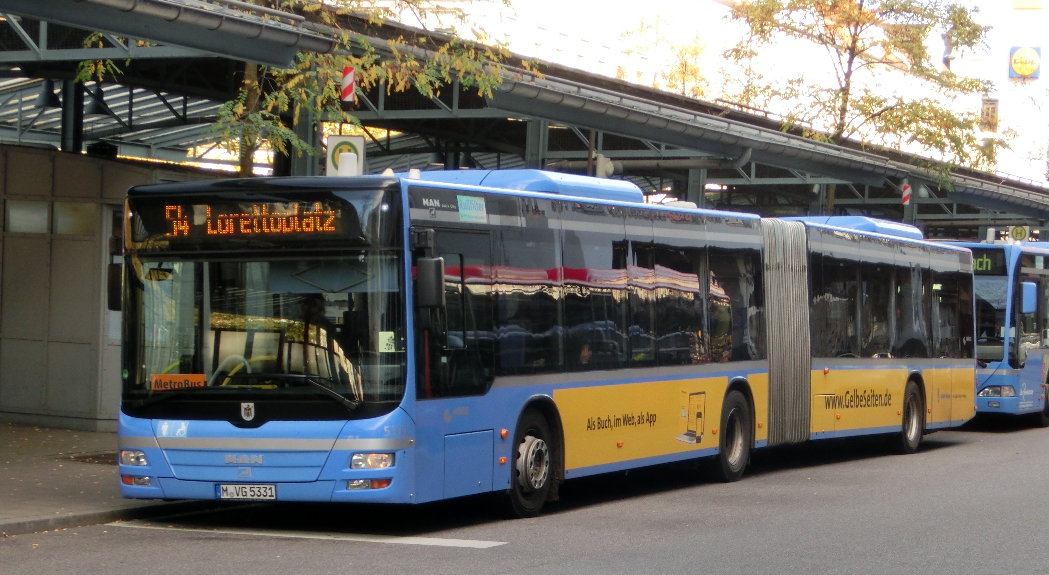 Ein MAN Lion's City G der Münchener Verkehrsgesellschaft (Wagennr. 5331) am 26. 10. 2013 am Münchener Ostbahnhof.